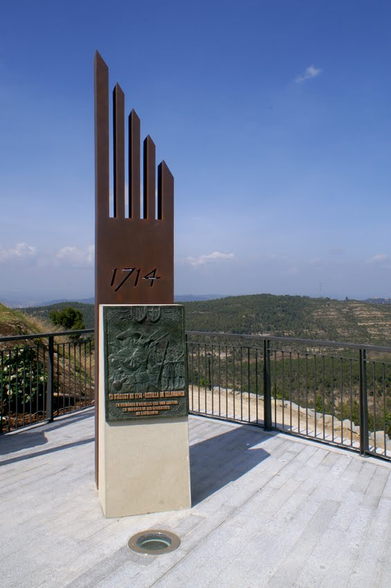 Memorial de guerra de la batalla de Talamanca (13 d'agost de 1714). El monòlit d'acer és obra de Jaume Soldevila i la placa de bronze dels escultors Mar Hernàndez Pongiluppi i Enric Passolas. La urbanització de l'espai i el monòlit foren sufragats pel municipi de Talamanca mentre la placa i l'estació didàctica foren costejats pel DIDPATRI de la Universitat de Barcelona.